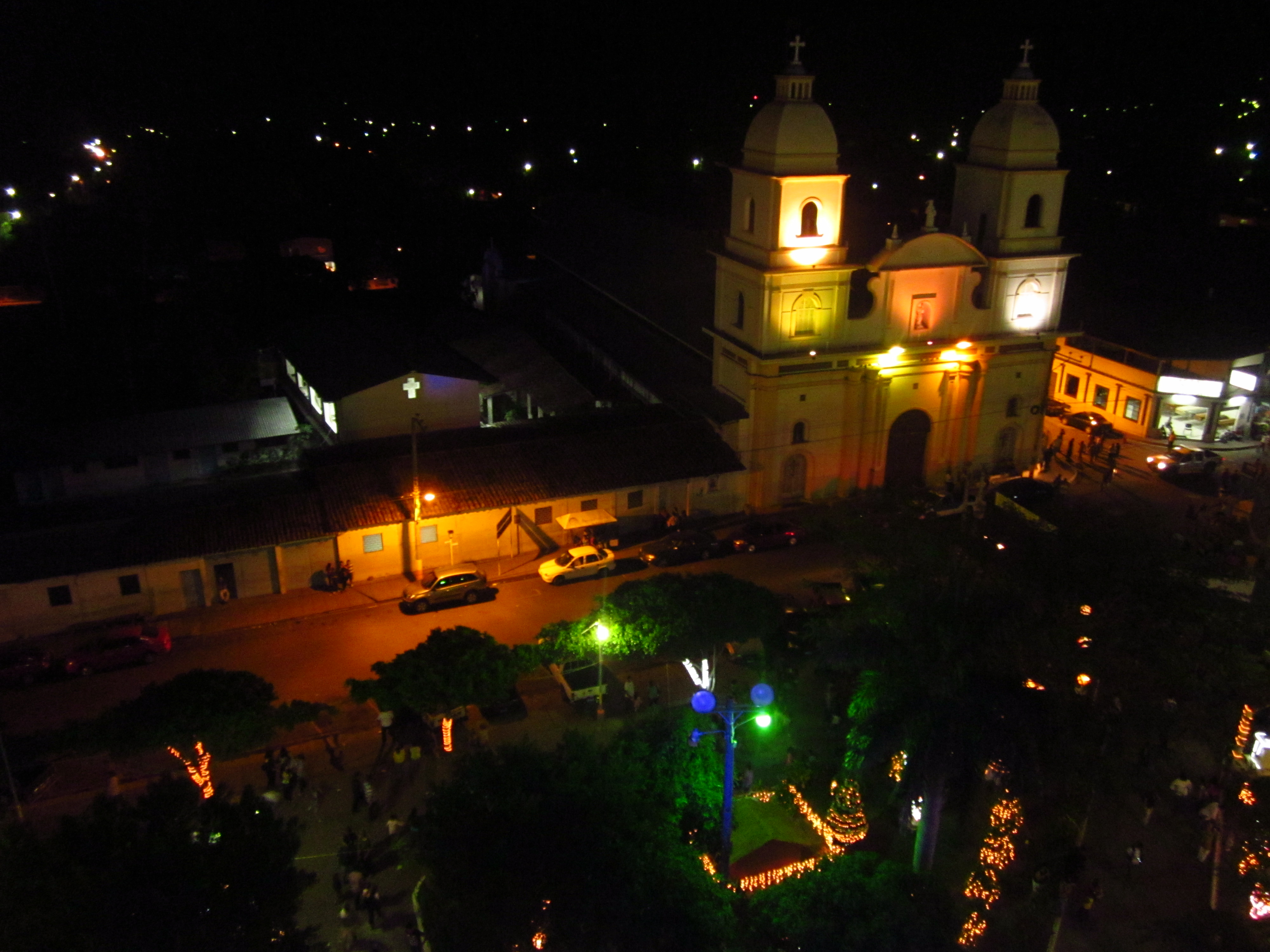 Catedral de San Vicente, vista nocturna durante las fiestas patronales